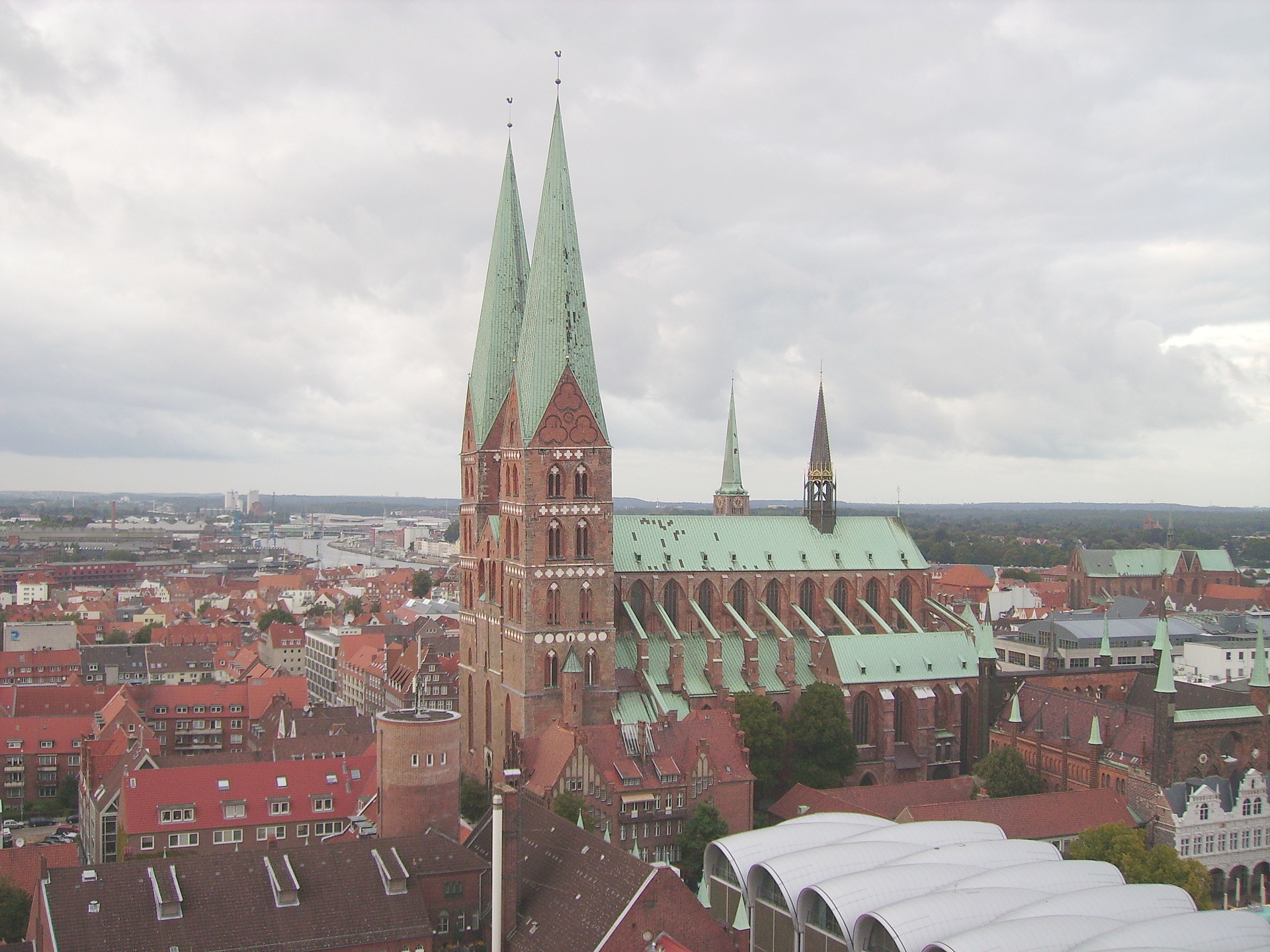 Blick auf die Marienkirche in Lübeck von St. Petri. Hinter dieser Kirche der Turm von St. Jakobi, rechts hinten St. Katharinen und rechts vorne das Rathaus.